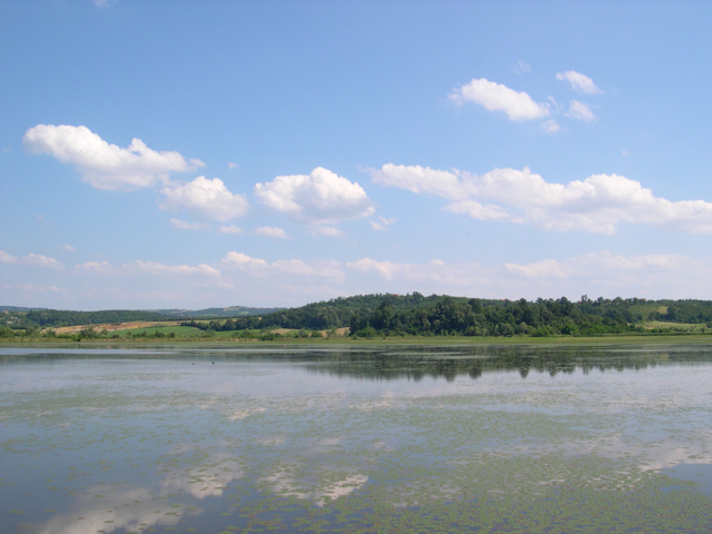 Dokmir lake, near Ub, Serbia/Le lac de Dokmir, près de Ub, Serbie